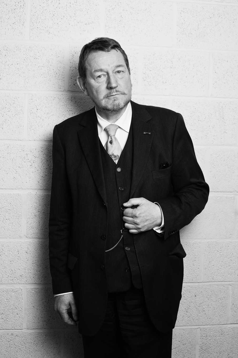 Nederlands dichter Uit de reeks "Dichters aan de muur", gefotografeerd tijdens de nacht van de poëzie te Aarschot